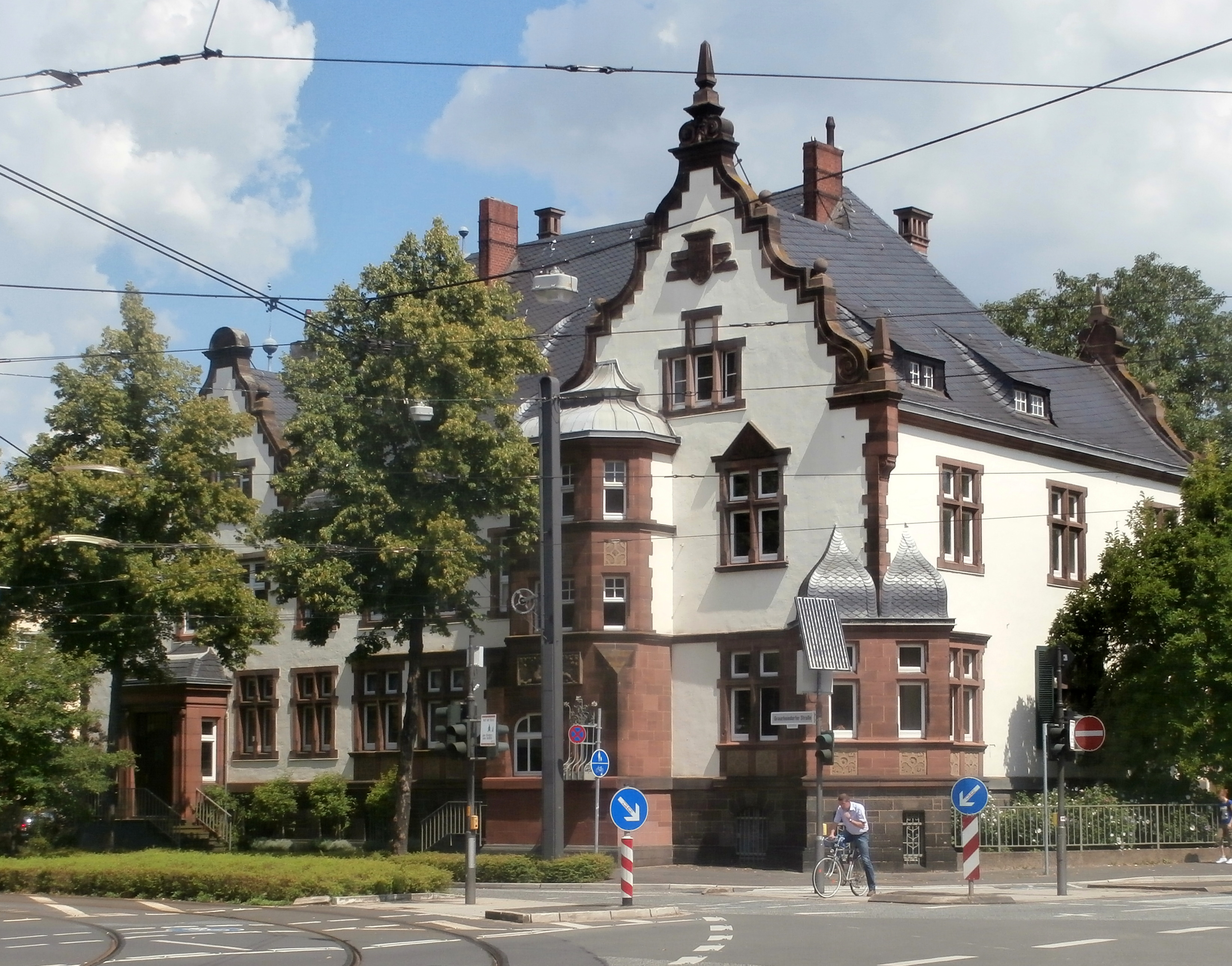 Ehemaliges Offizierskasino, Graurheindorfer Straße 90, Bonn-Castell